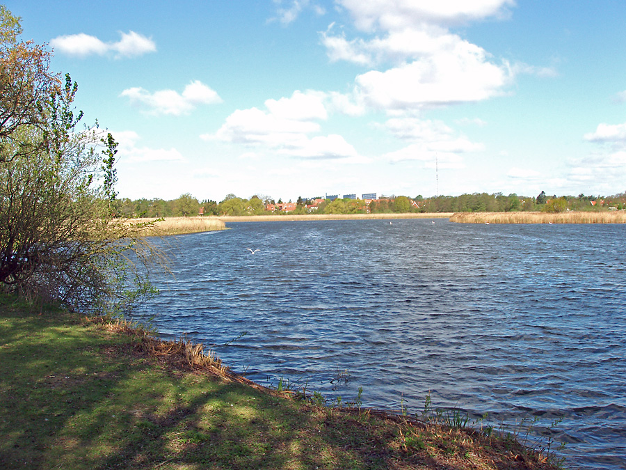 Utterslev Mose, Copenhagen